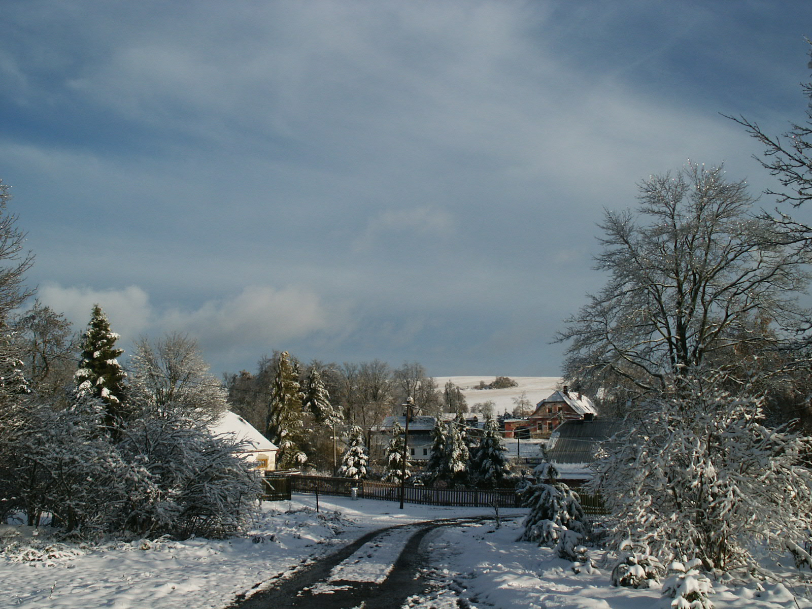 Májůvka, pohled od bývalých kravínů-zatím bez větrných elektráren!